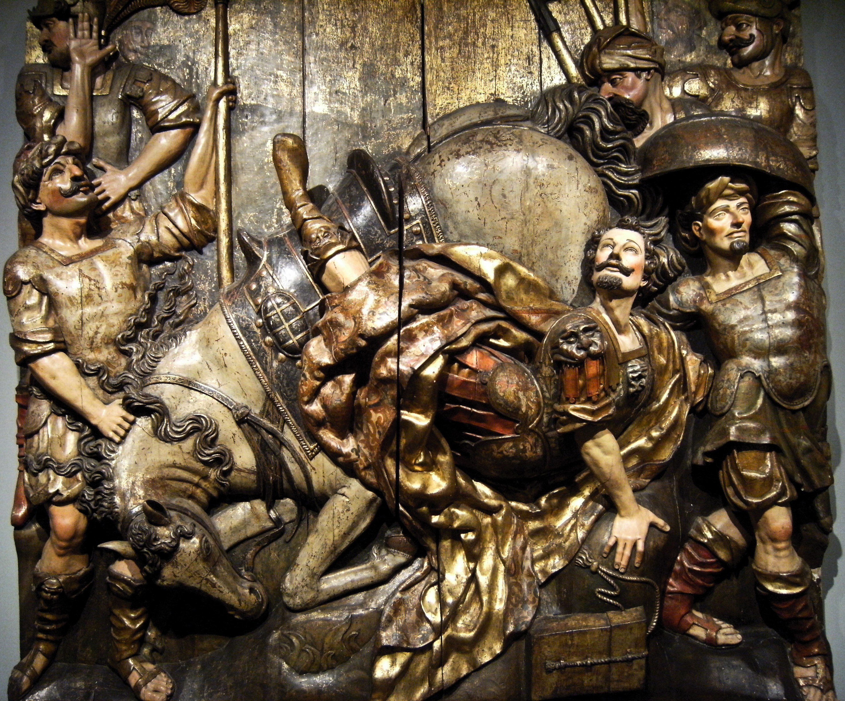 Relieve en madera del siglo XVI que representa la Conversión de San Pablo. Procede del retablo mayor de la iglesia del desaparecido convento de San Pablo de Burgos y en la actualidad se encuentra en el Museo Marès de Barcelona.